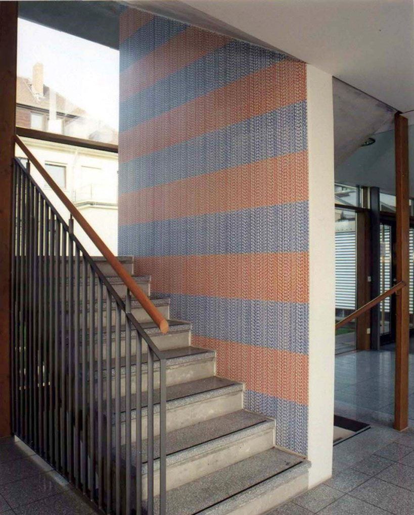 Wohnheim für Stipendiaten aus Entwicklungsländern, Groß-Gerau. Wandgestaltung von Saskia Schüler, Lackstifte auf grundierte Betonwand